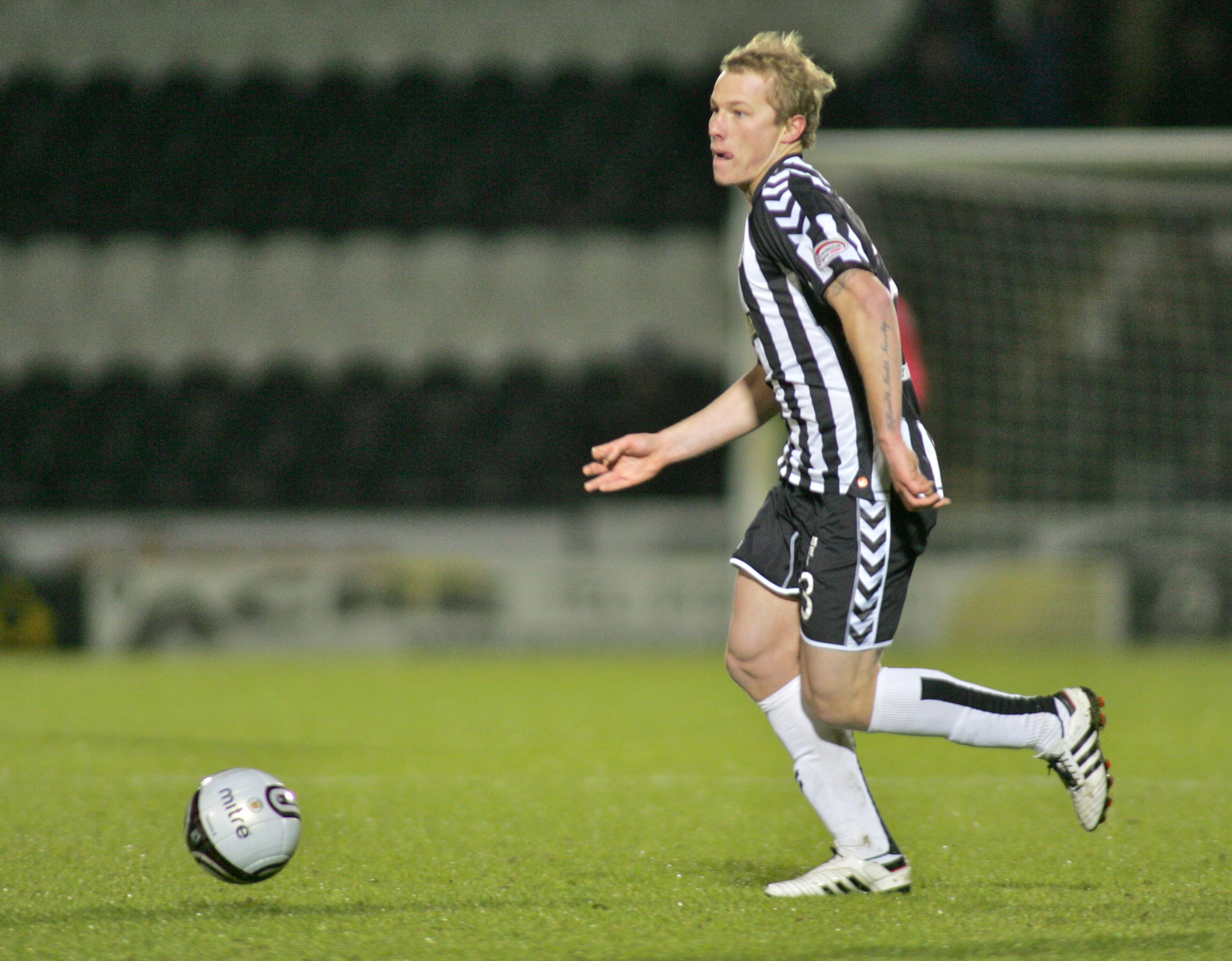 St Mirren vs Peterhead